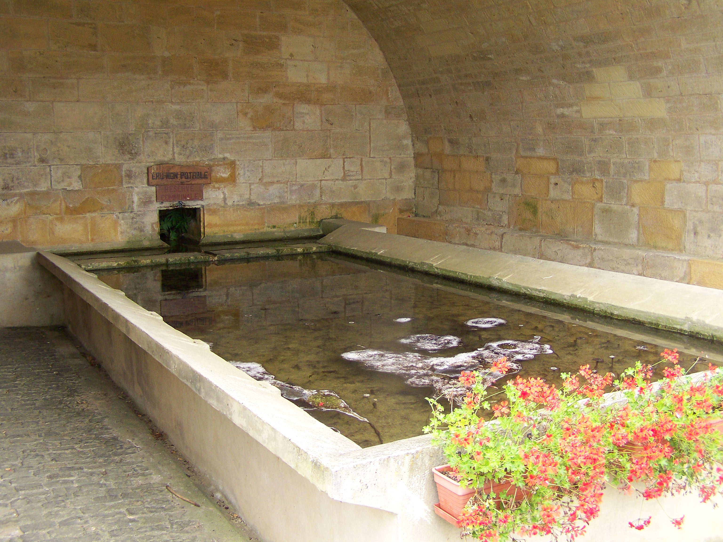 Photo 1 du lavoir de Chénières